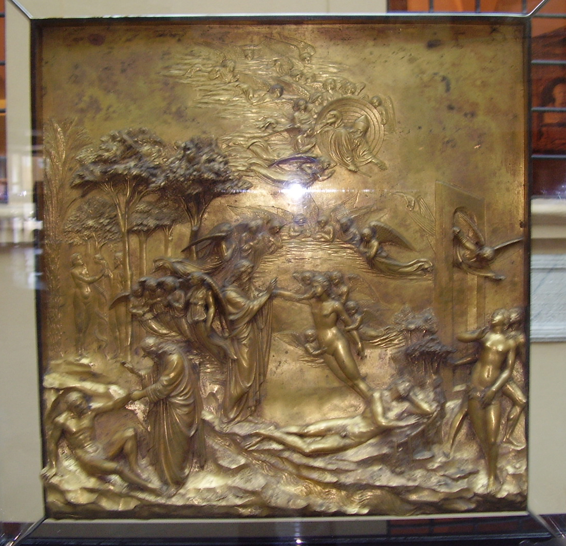 Formella battistero 1 adamo e eva